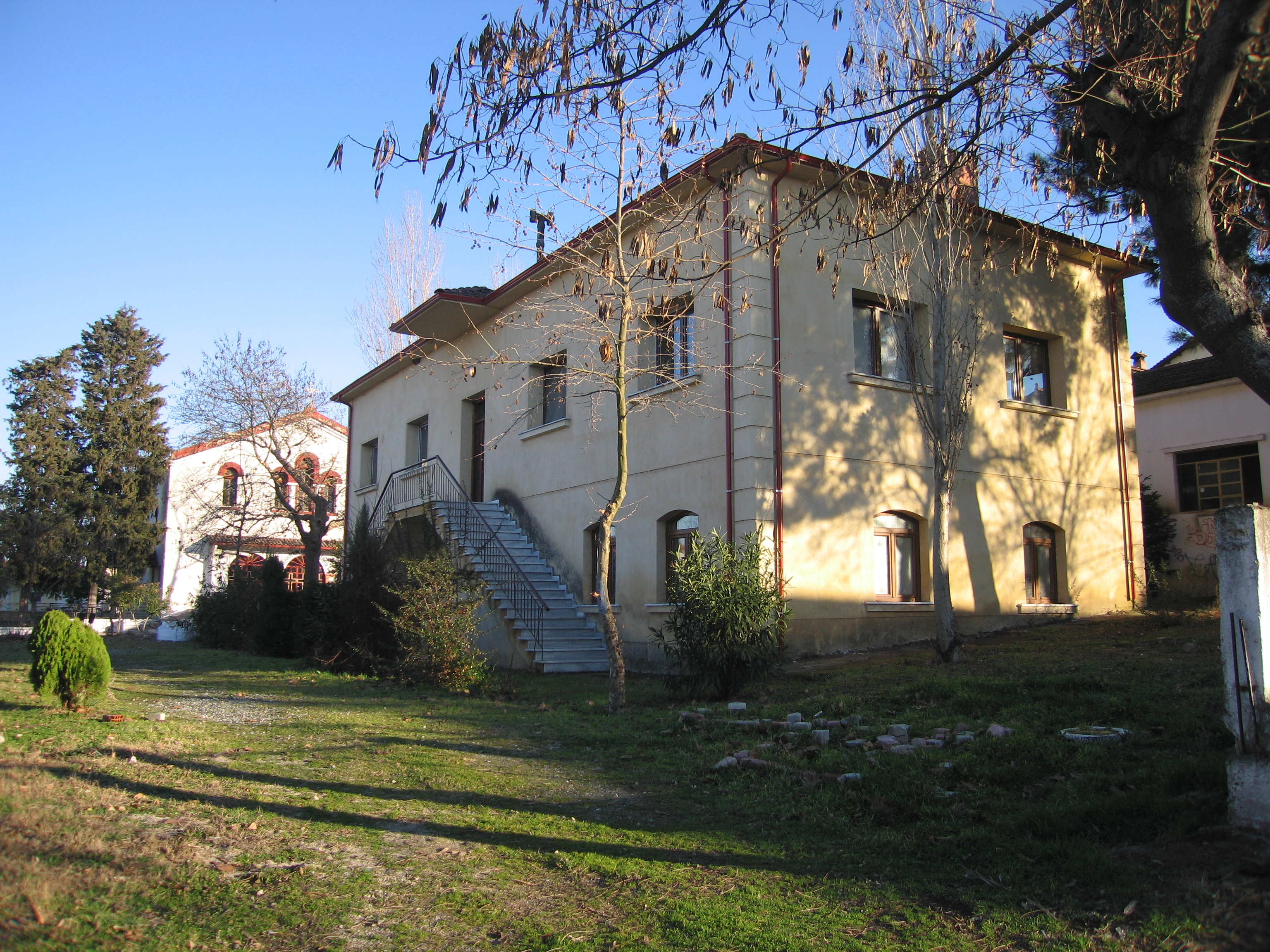 Παλιό Γυμνάσιο - Γραφεία Πολιτιστικού Συλλόγου